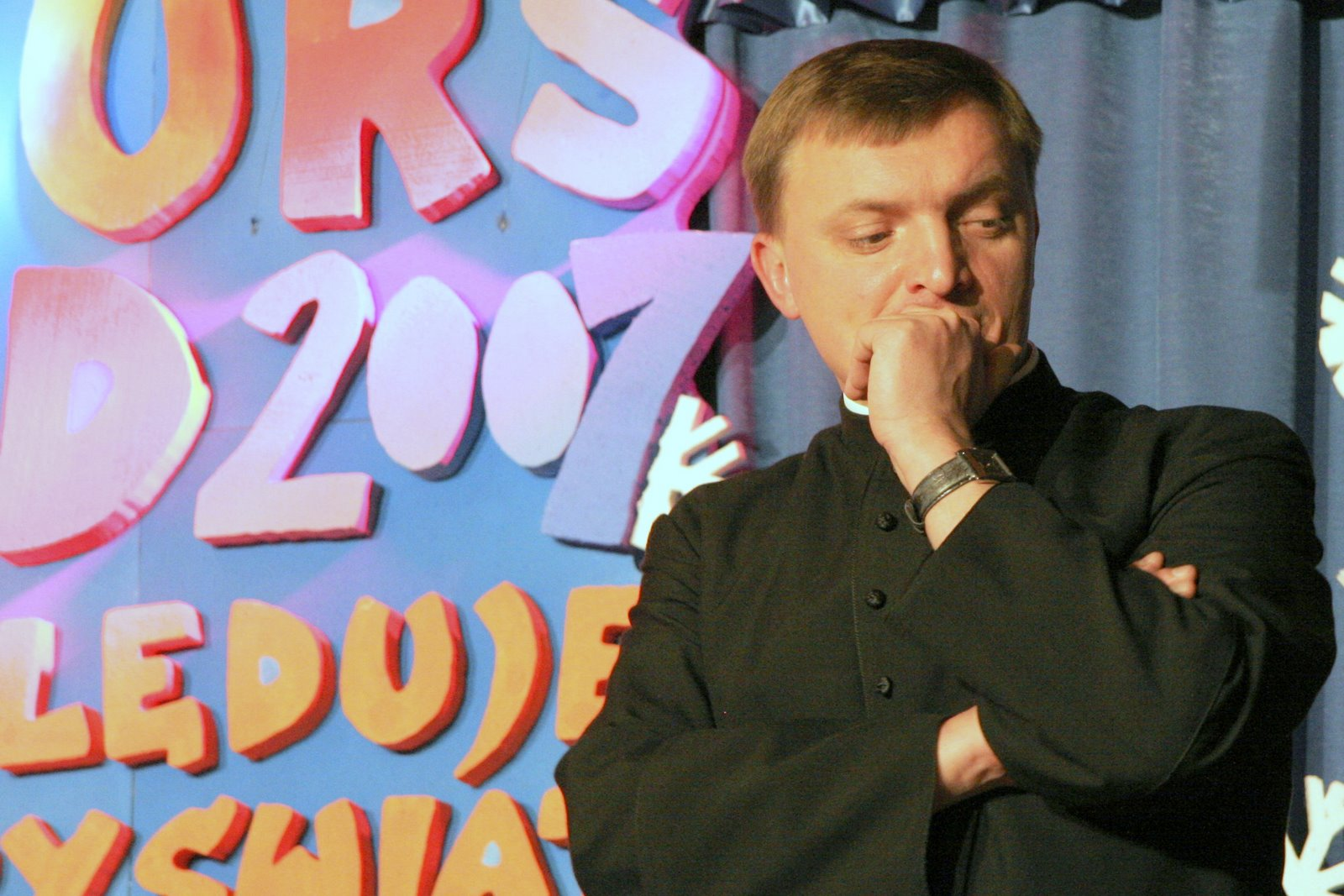 Ks. Tomasz Pilarczyk, twórca Archidiecezjalnego Konkursu Kolęd i Pastorałek „Niech kolęduje z nami cały świat”, Zakopane 2007